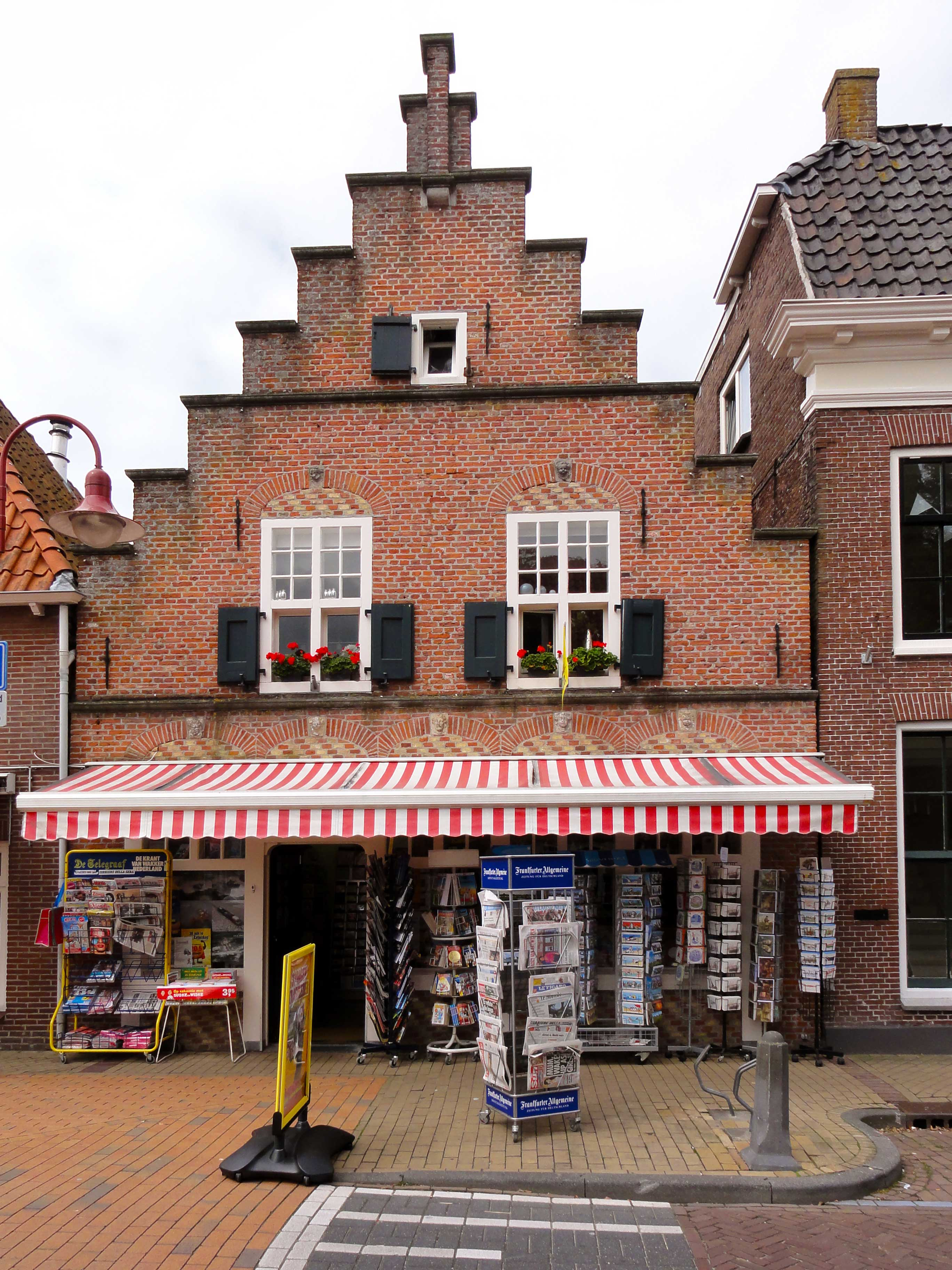 Kerkstraat 17 te Makkum